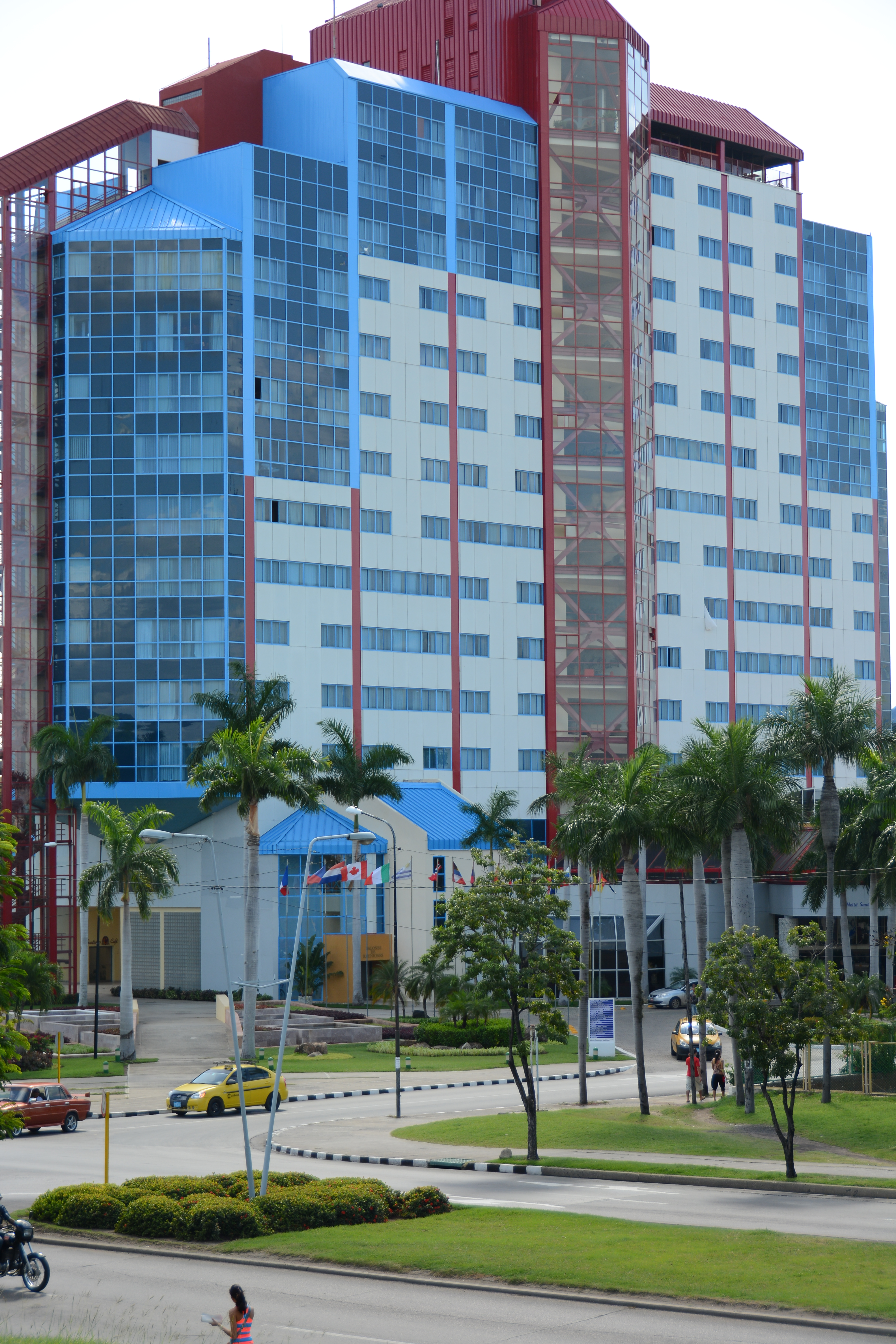 Hotel Melía Santiago, Santiago de Cuba